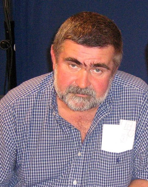 Janusz Rewiński - polski aktor, satyryk i polityk